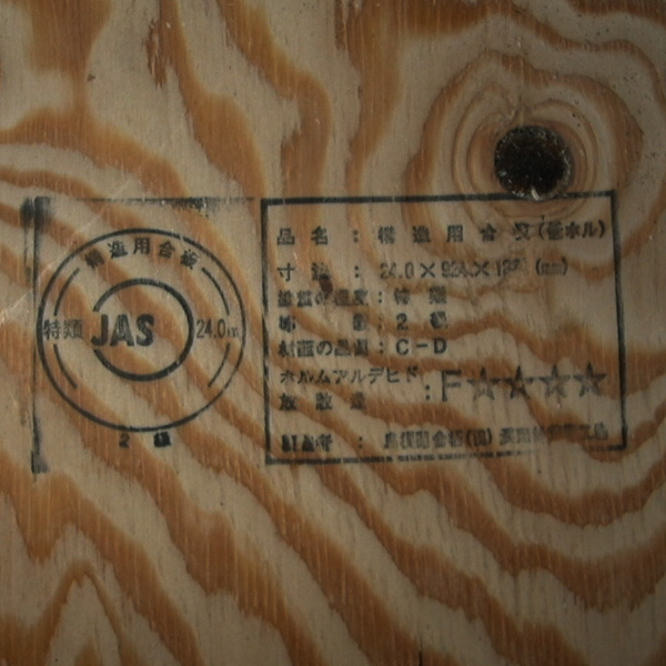 構造用合板_スタンプ_01